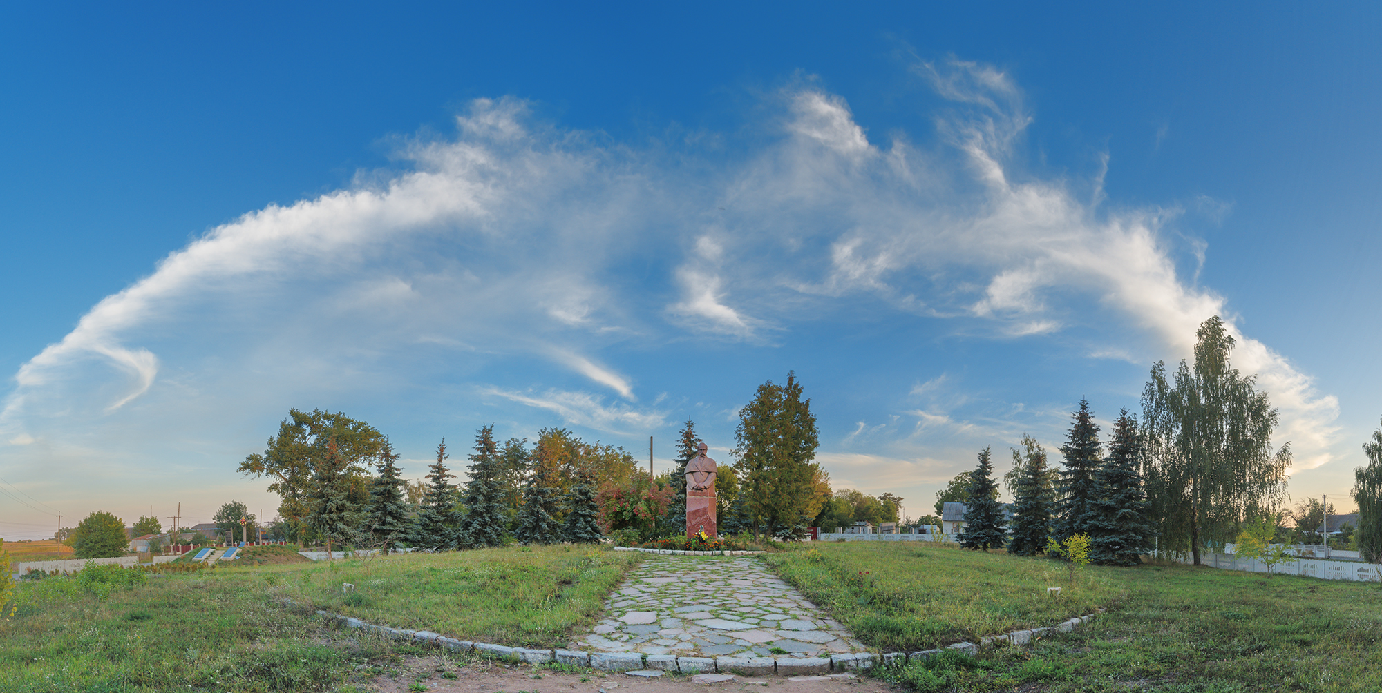 Пам'ятник Шевченку Т. Г., українському поету, Житомирський район, с. Кодня , Коднянська с/р, в центрі